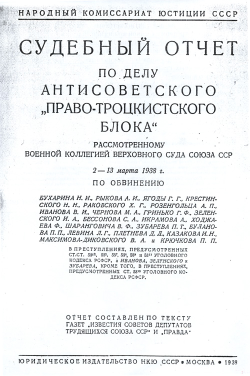 Судебный отчёт о деле право-троцкистского блока.